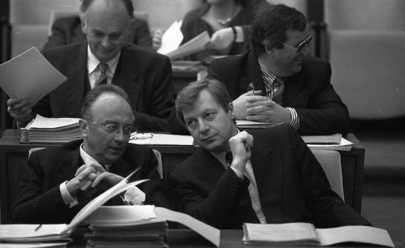 26.2.1988 Bundesratssitzung